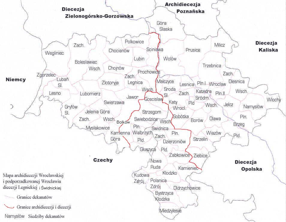 Archidiecezja wrocławska współcześnie